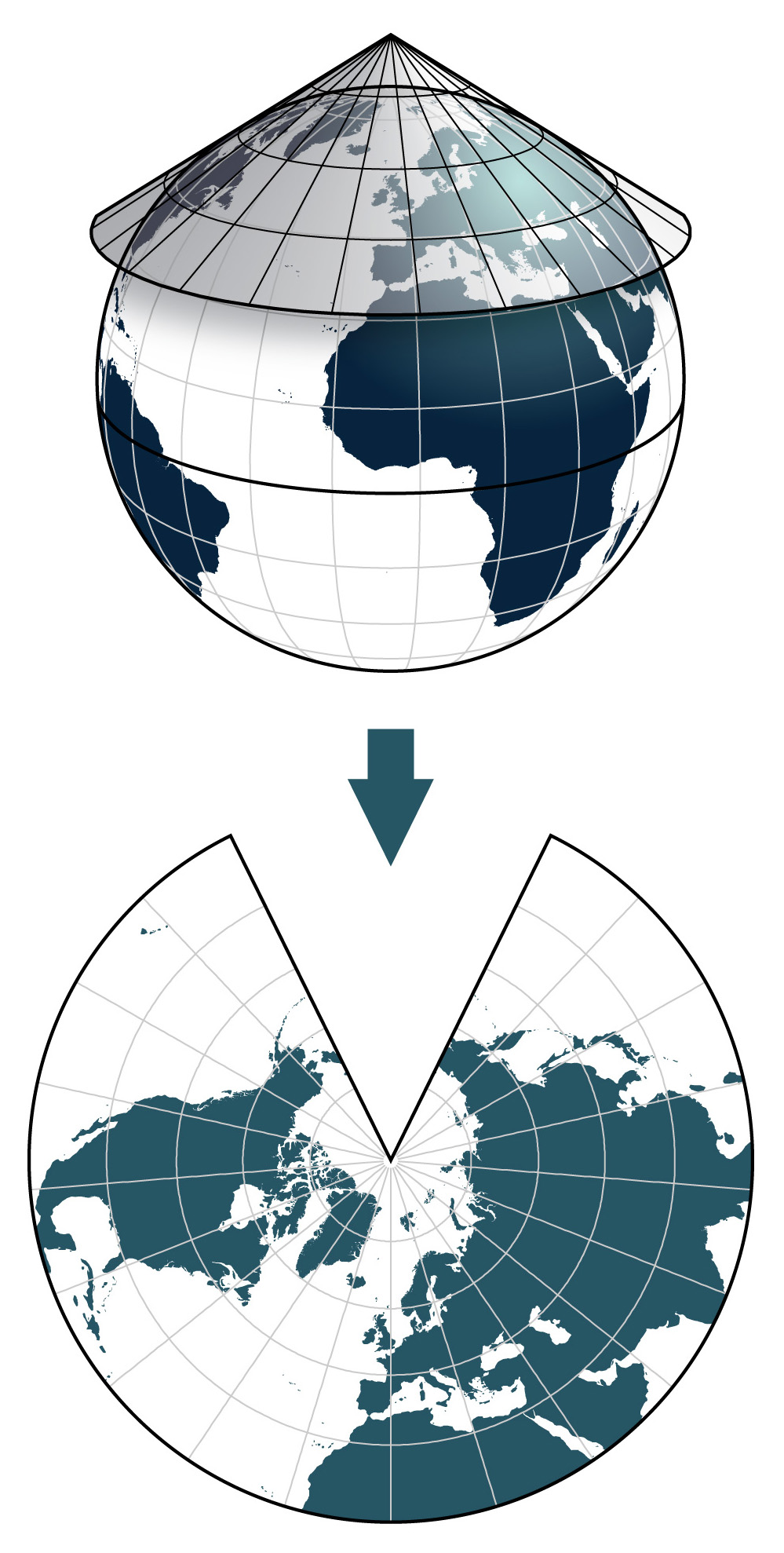 Koonilise projektsioonilaotuse loomine